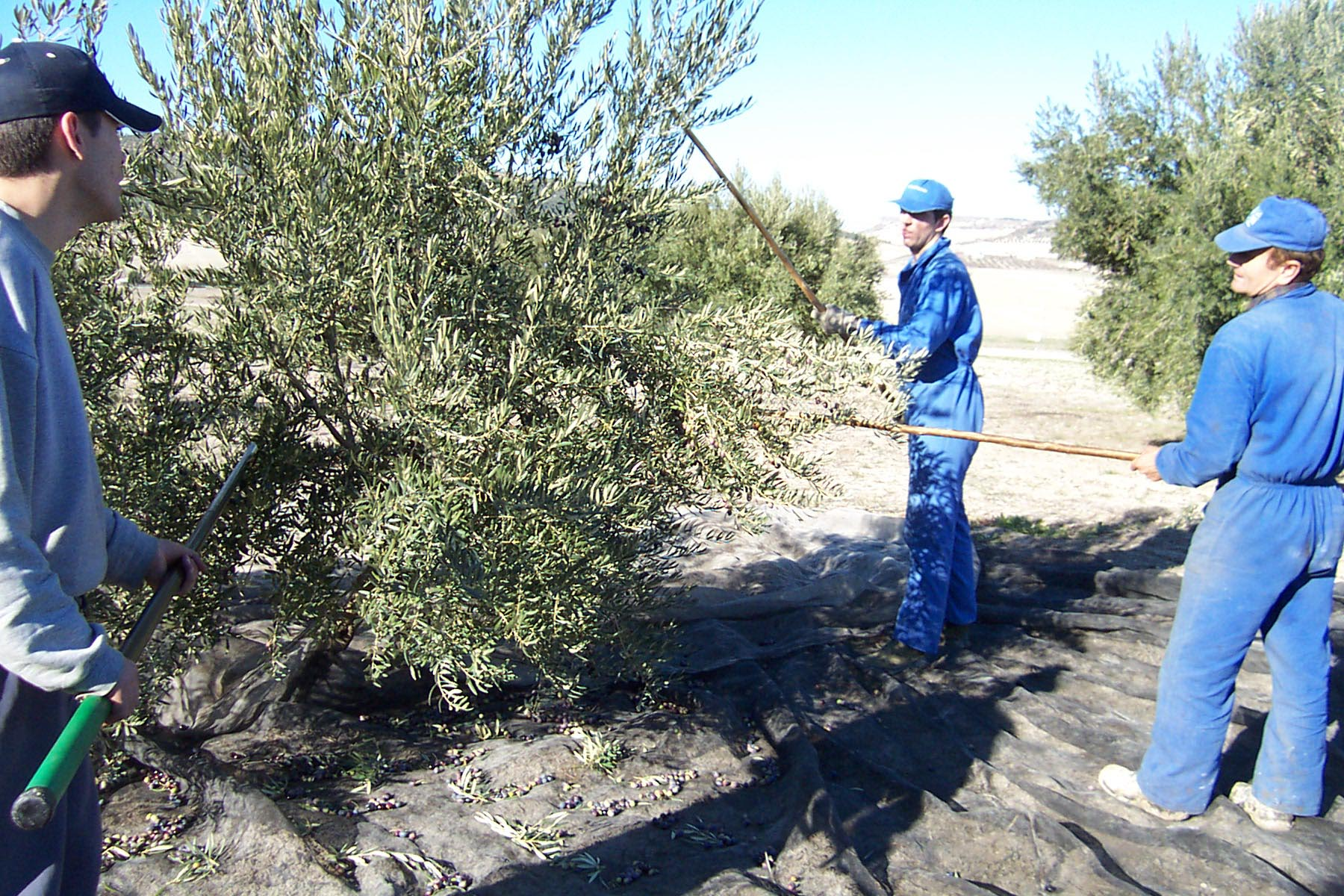 Aceituneros en Jaén. Trabajadores de recolección de aceitunas, en Alcalá la Real (Jaén, España). Runa Simi: Asitunas pallachkaq runakuna, Alcalá la Real, Jaén, Ispaña.